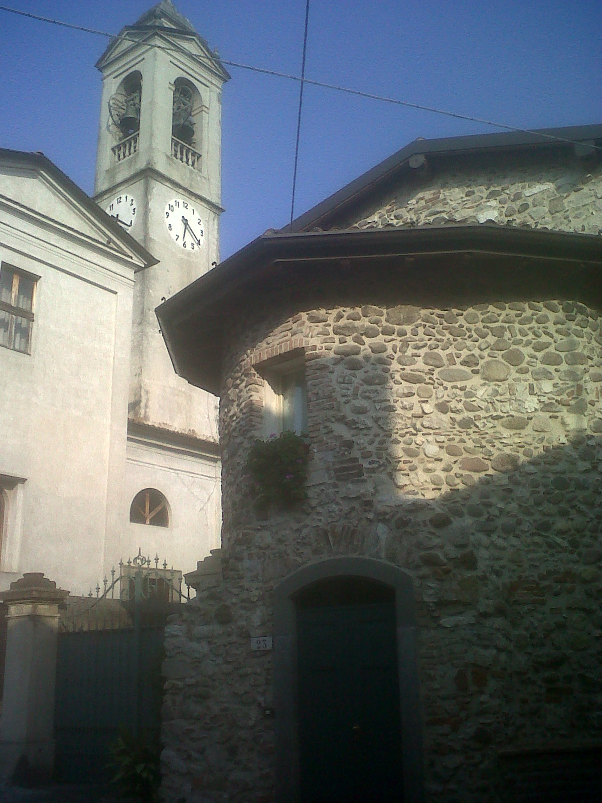 Chiesa vecchia e piazza antistante.